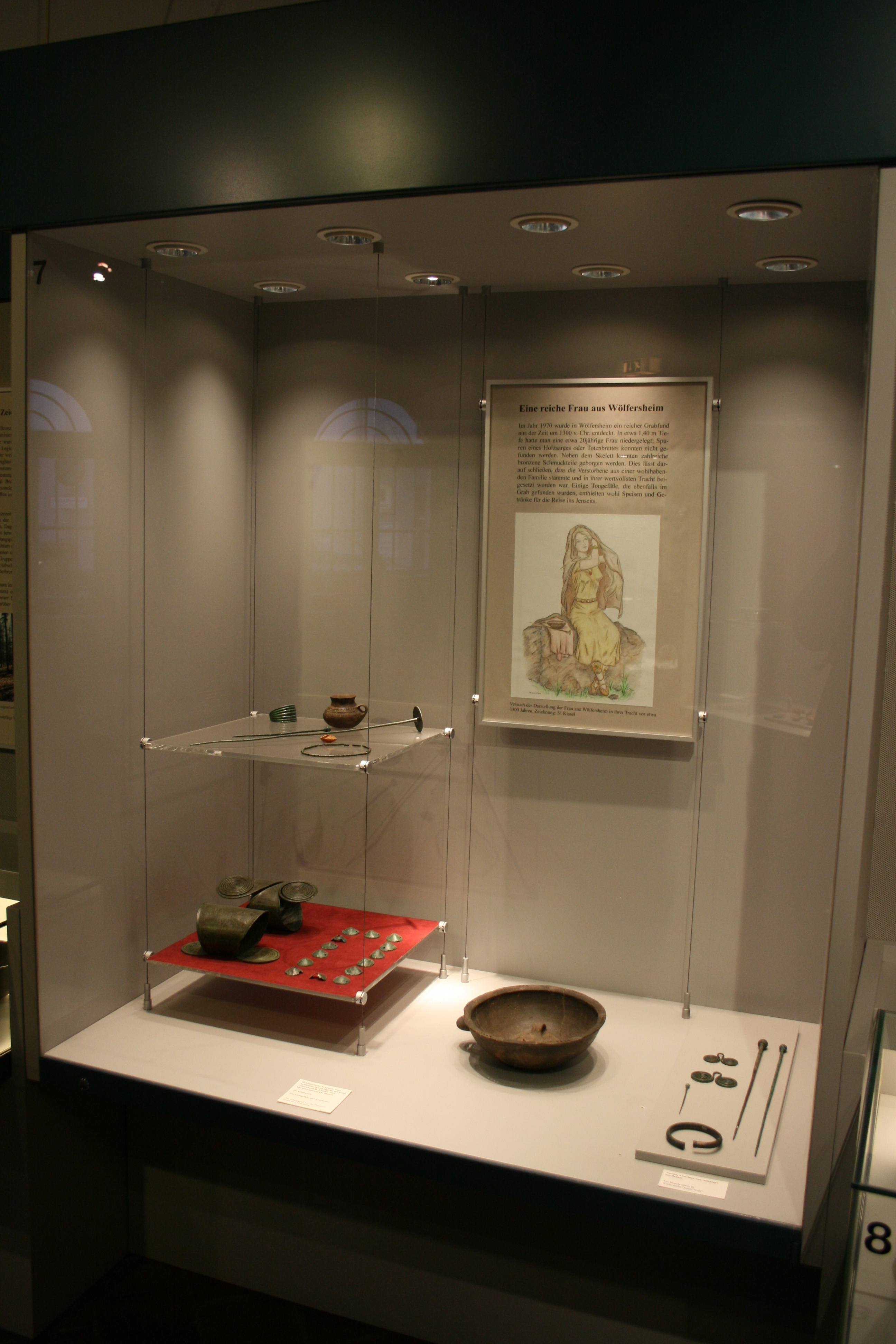 Bronzezeitliches Grab aus Wölfersheim (BZ Stufe Wölfersheim) im Wetterau-Museum Friedberg. Mit freundlicher Genehmigung des Museums.